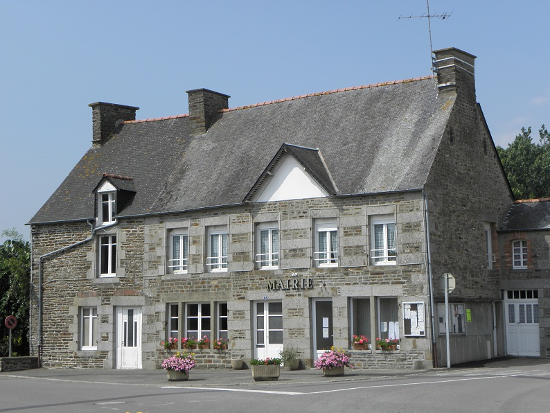 Mairie de Vessey (50).